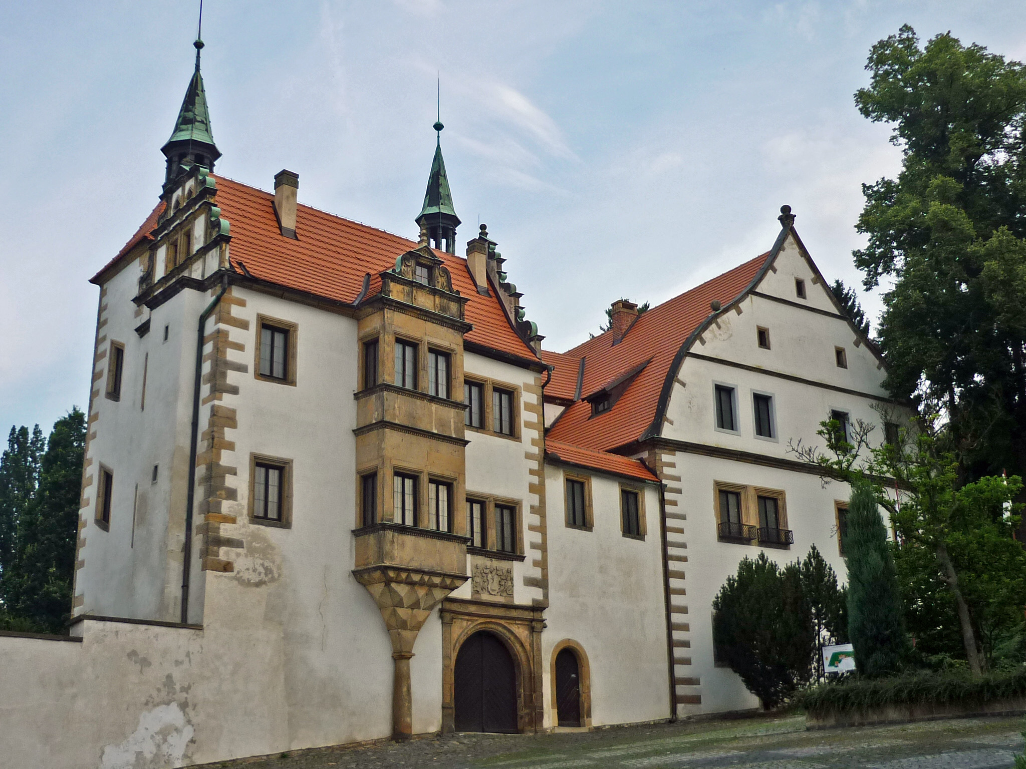 Unteres Schloss in Bensen (Benešov nad Ploučnicí), hier Johann- bzw. Anton-Schloss und Wolf-Schloss (links)